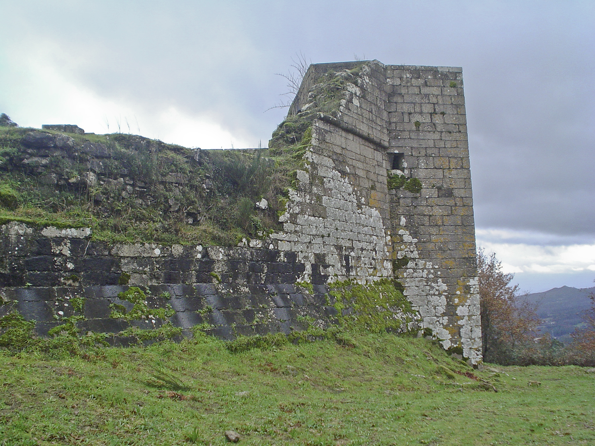 Torres de Altamira. Parede do Palacio